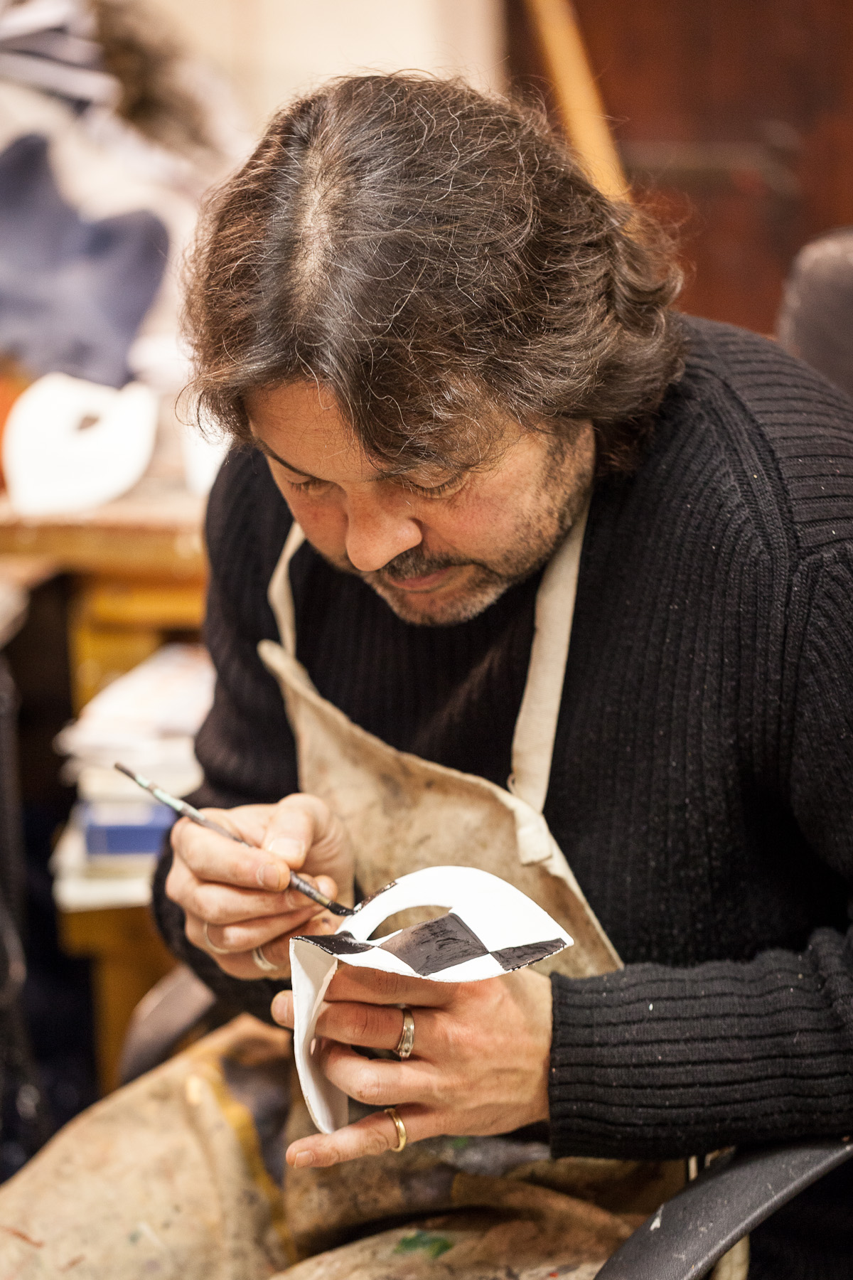 Carnevale